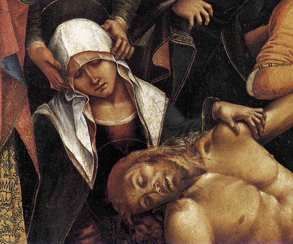 detail